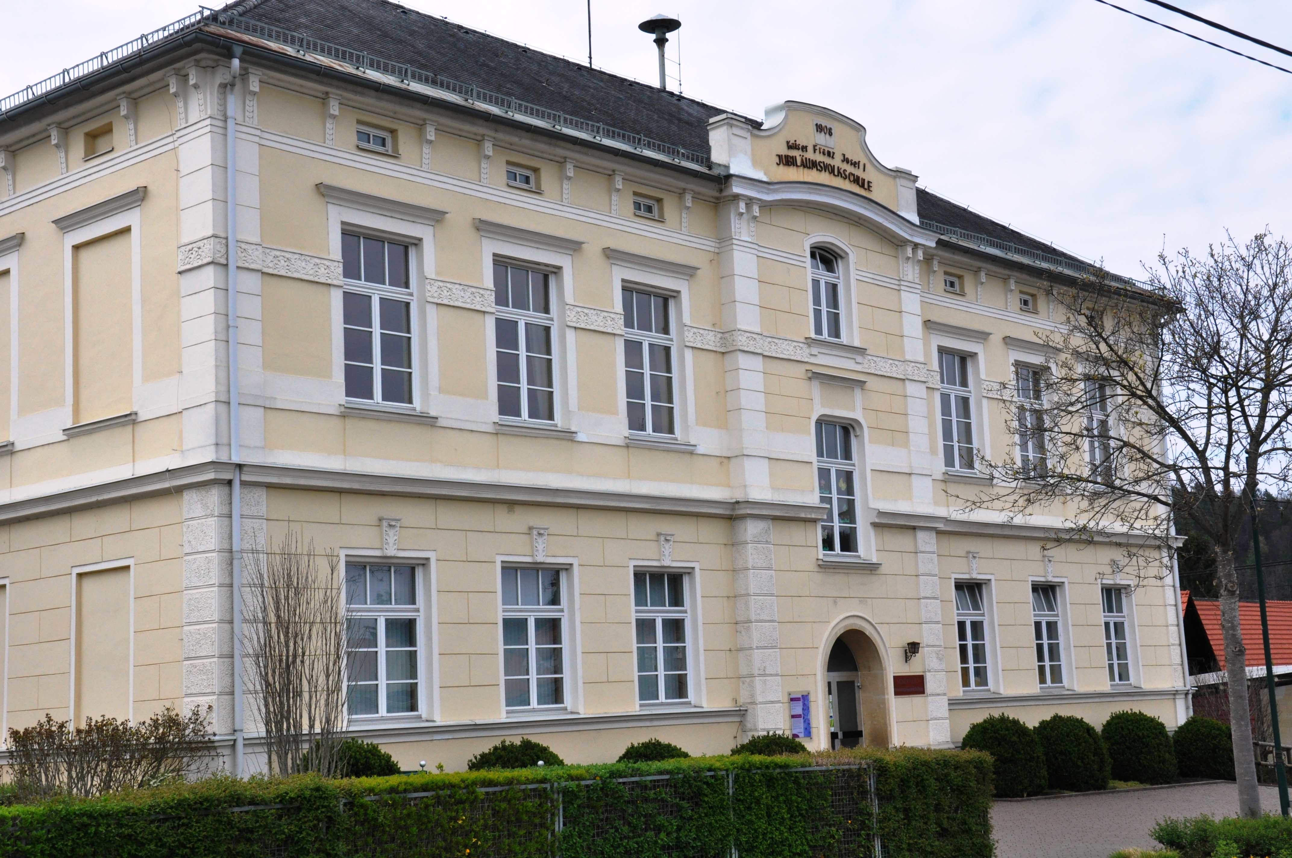 Ehem. Franz-Josef-Jubiläumsschule